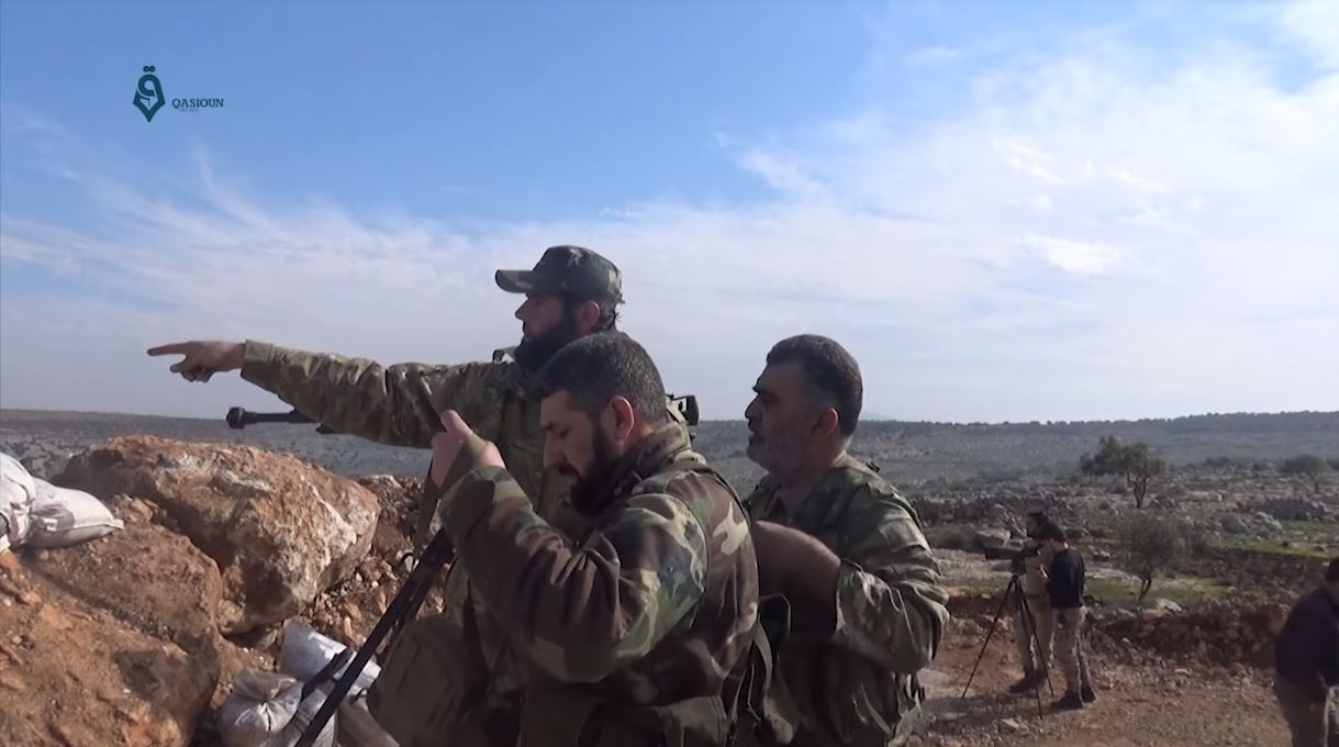 Rebelles de la 23e division de l'Armée syrienne libre, près d'Afrine, le 7 février 2018.